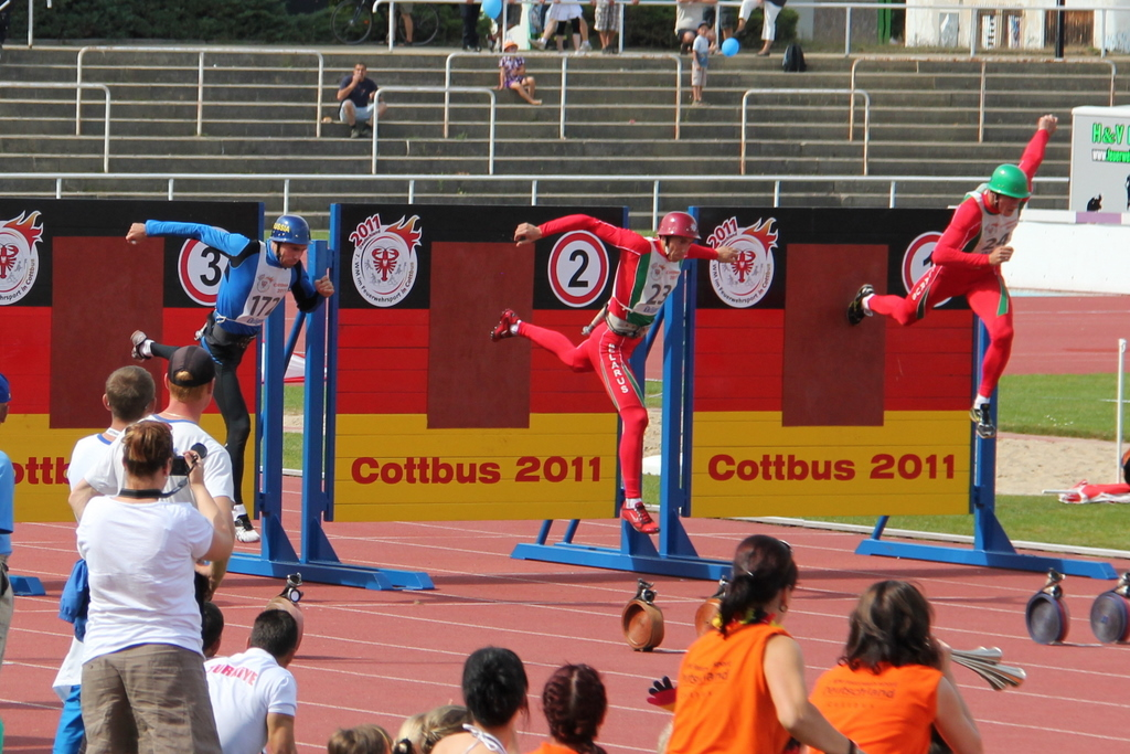 Участники VII Чемпионата Мира по пожарно-спасательному спорту преодолевают забор на дистанции 100-метровой полосы с препятствиями